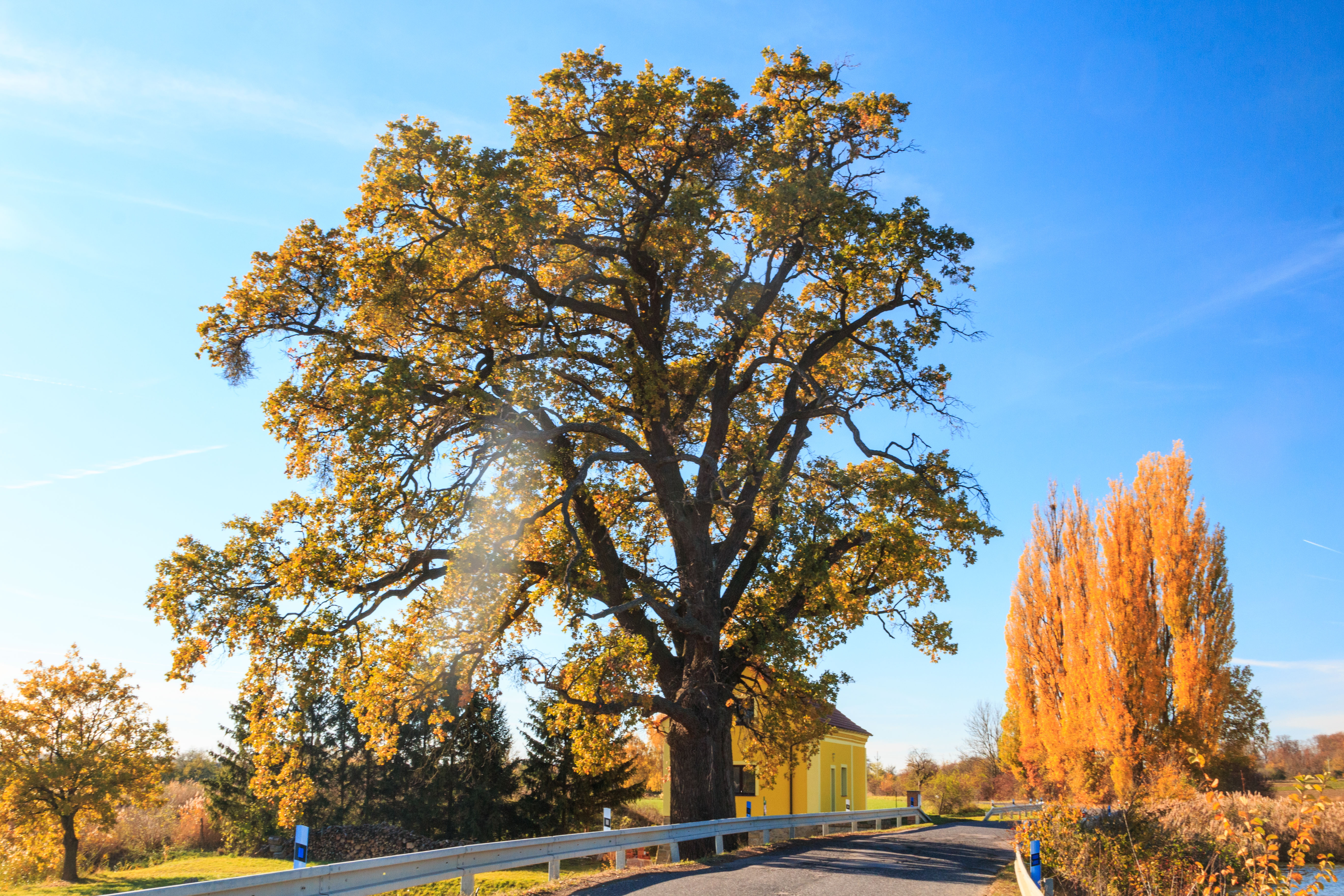 Dub u Čejkova rybníka